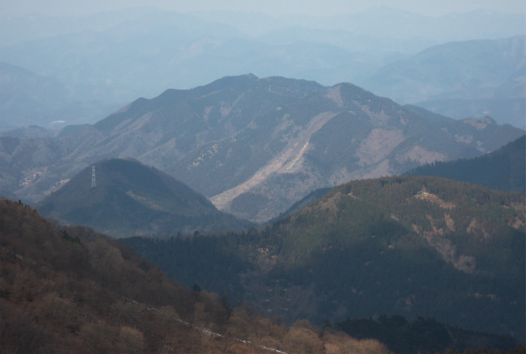 仏果山より望む石老山